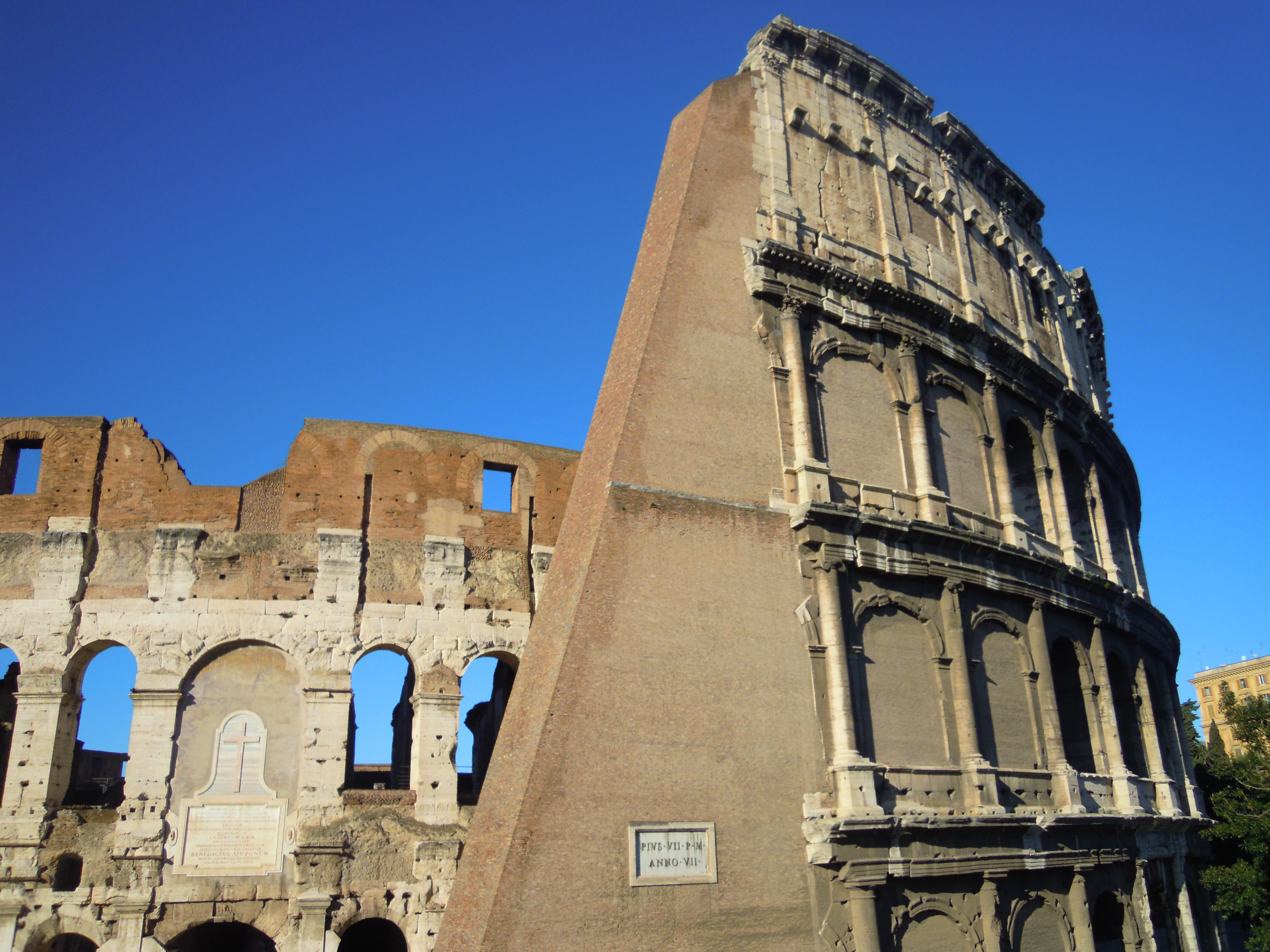 coliseo romano